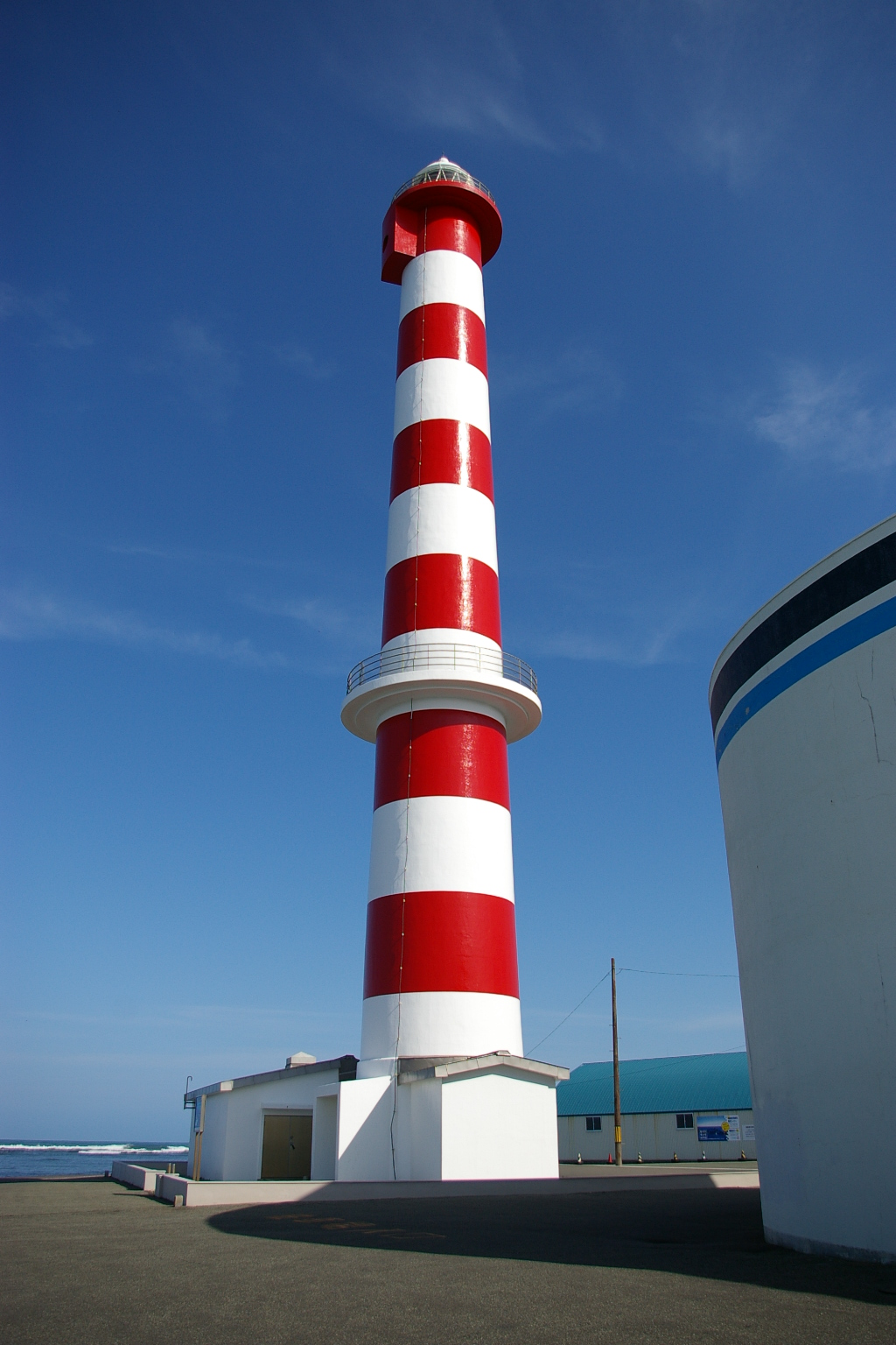 Wakkanai lighthouse.